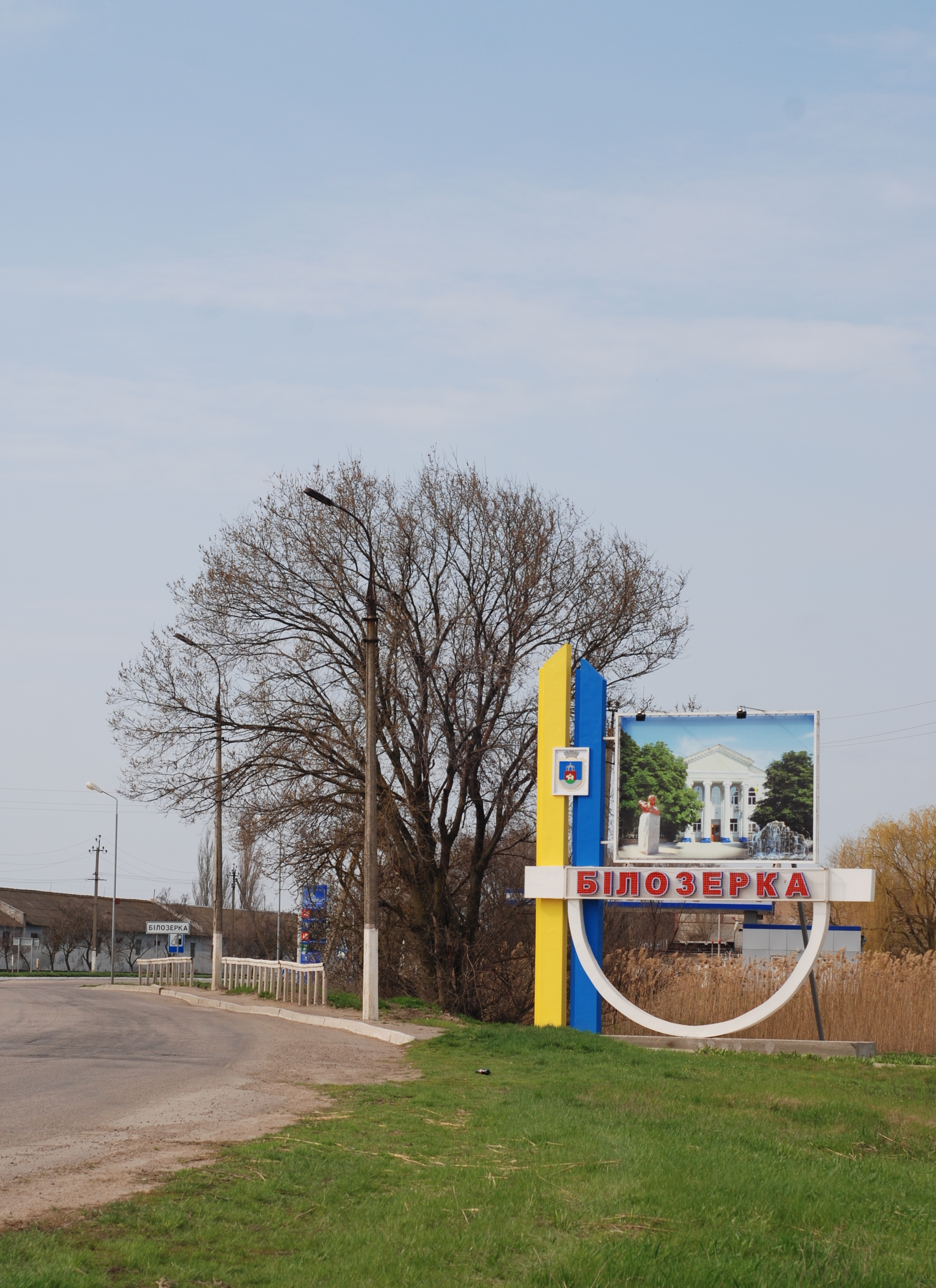 смт. Білозерка